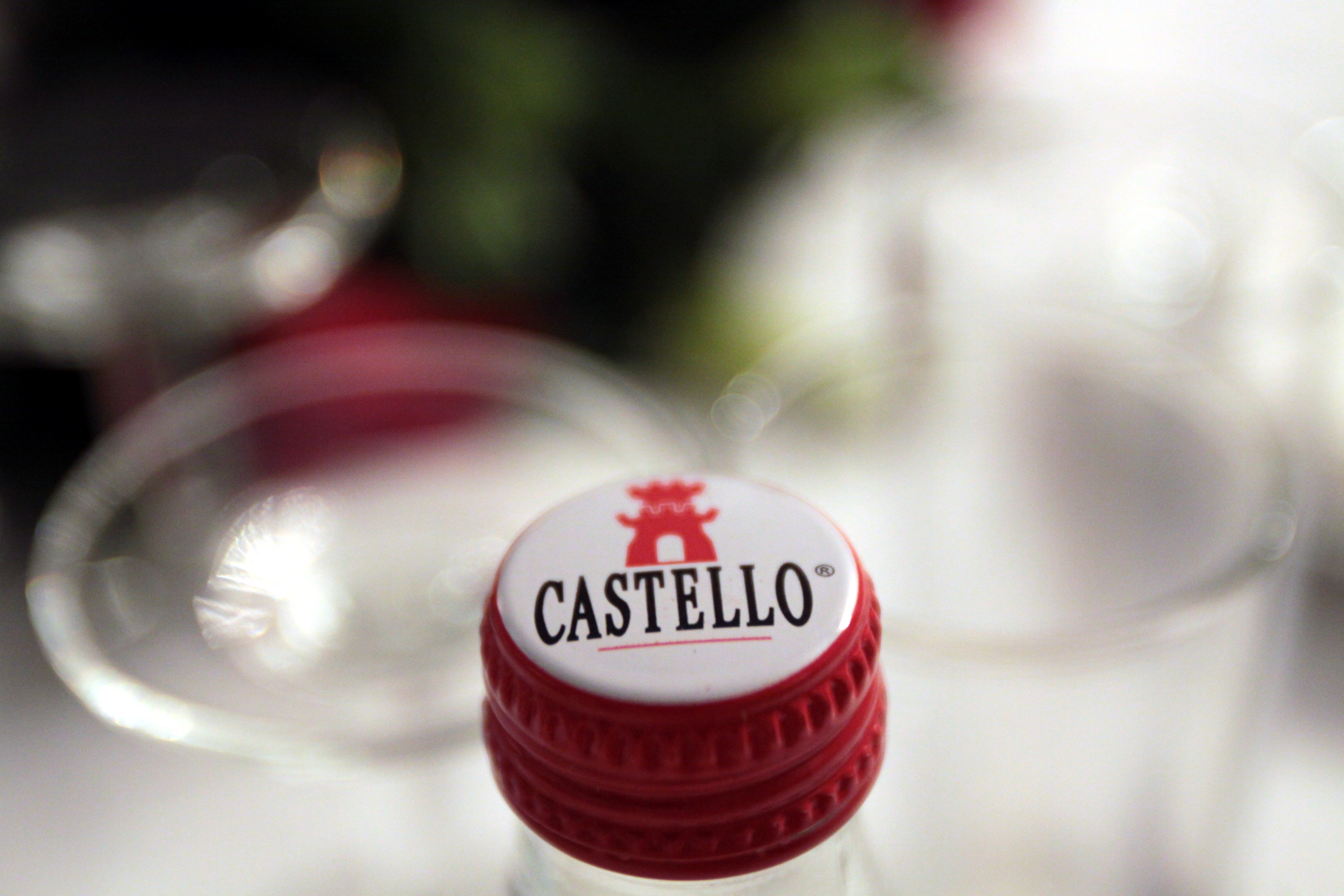 Água Castello, de Portugal.